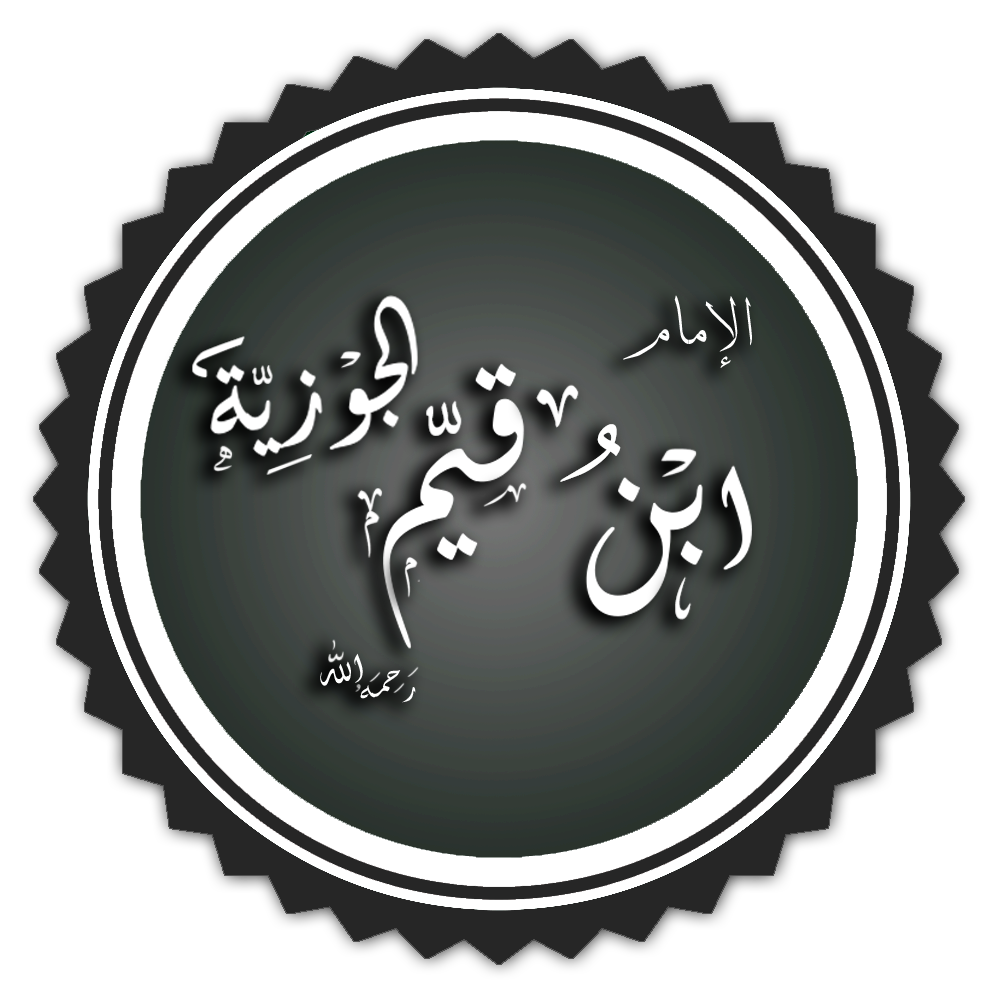 تخطيط اسم ابن قيم الجوزية رحمه الله